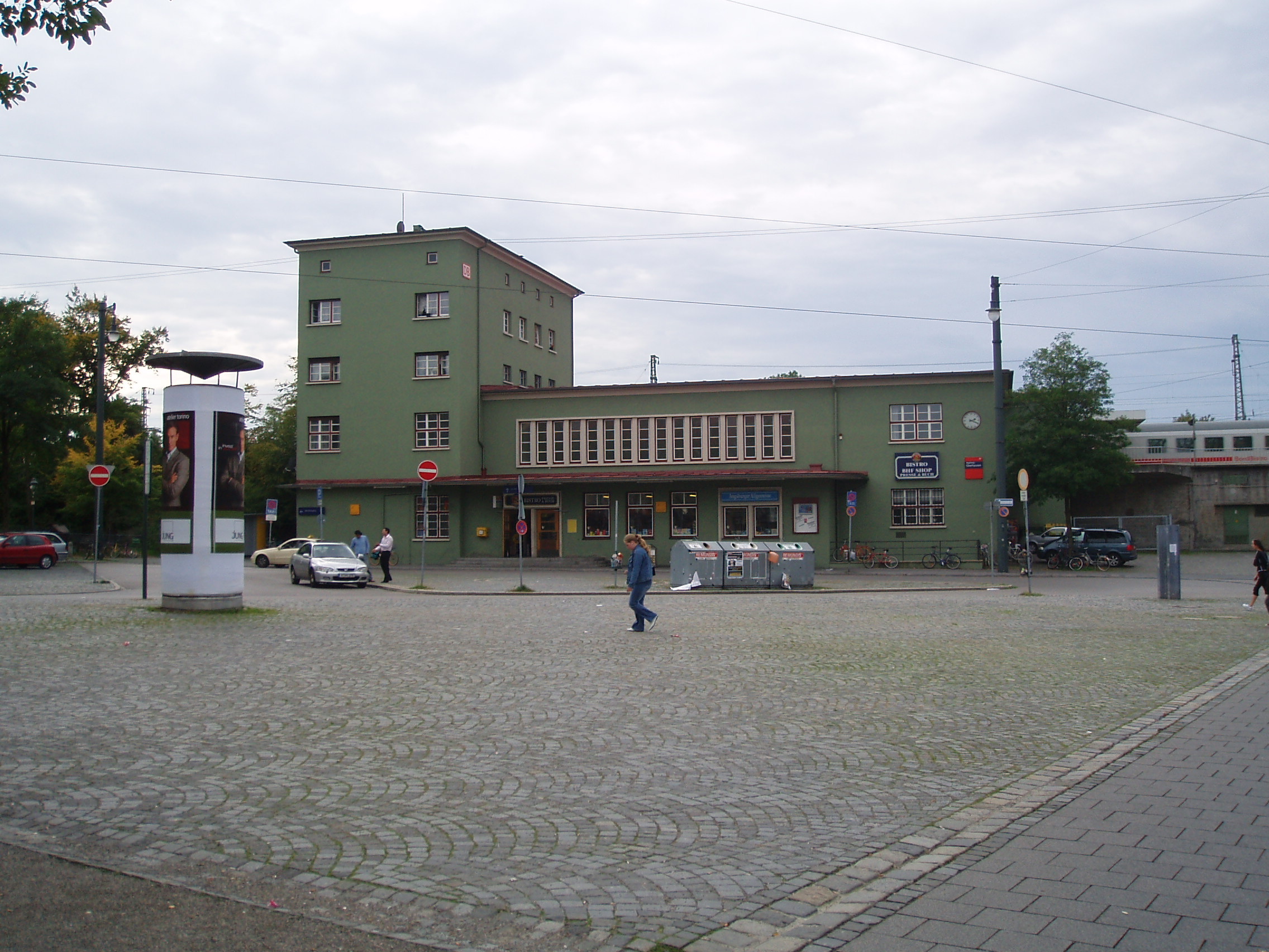 Bahnhof Augsburg-Oberhausen